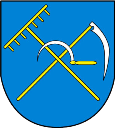 Herb Pogwizdowa w powiecie cieszyńskim, gminie Hażlach